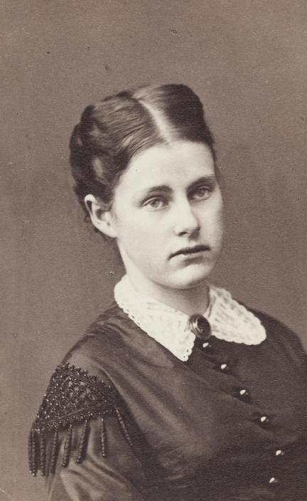 Atelier Adèle (Adele Perlmutter, 1845-1941): Mathilde, Erzherzogin von Österreich (1849-1867). Bildnis in jungen Jahren. Portraitfotografie, Brustbildnis, 1867. [1]